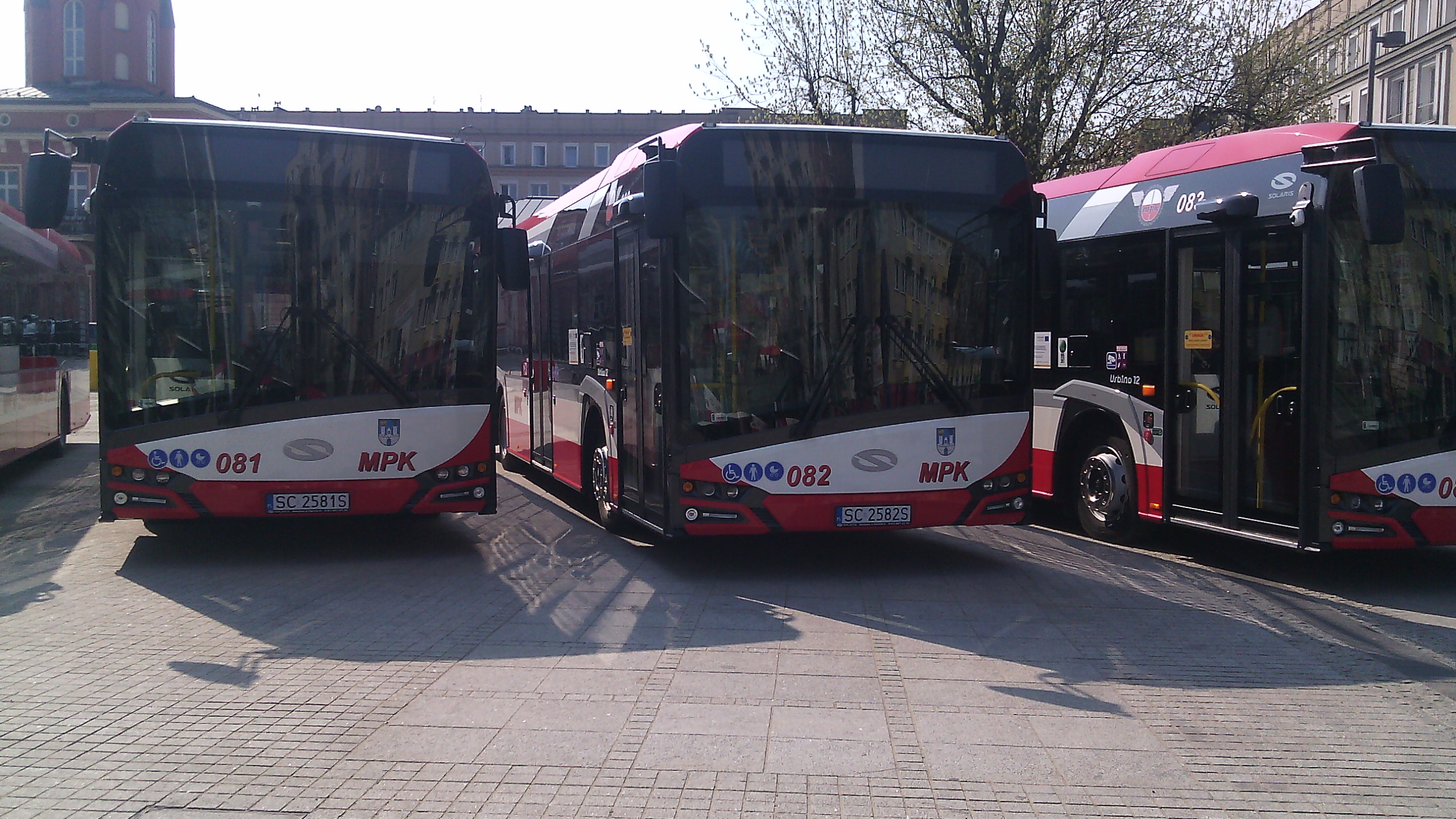 Częstochowa, Solarisy Urbino 12 IV, prezentacja